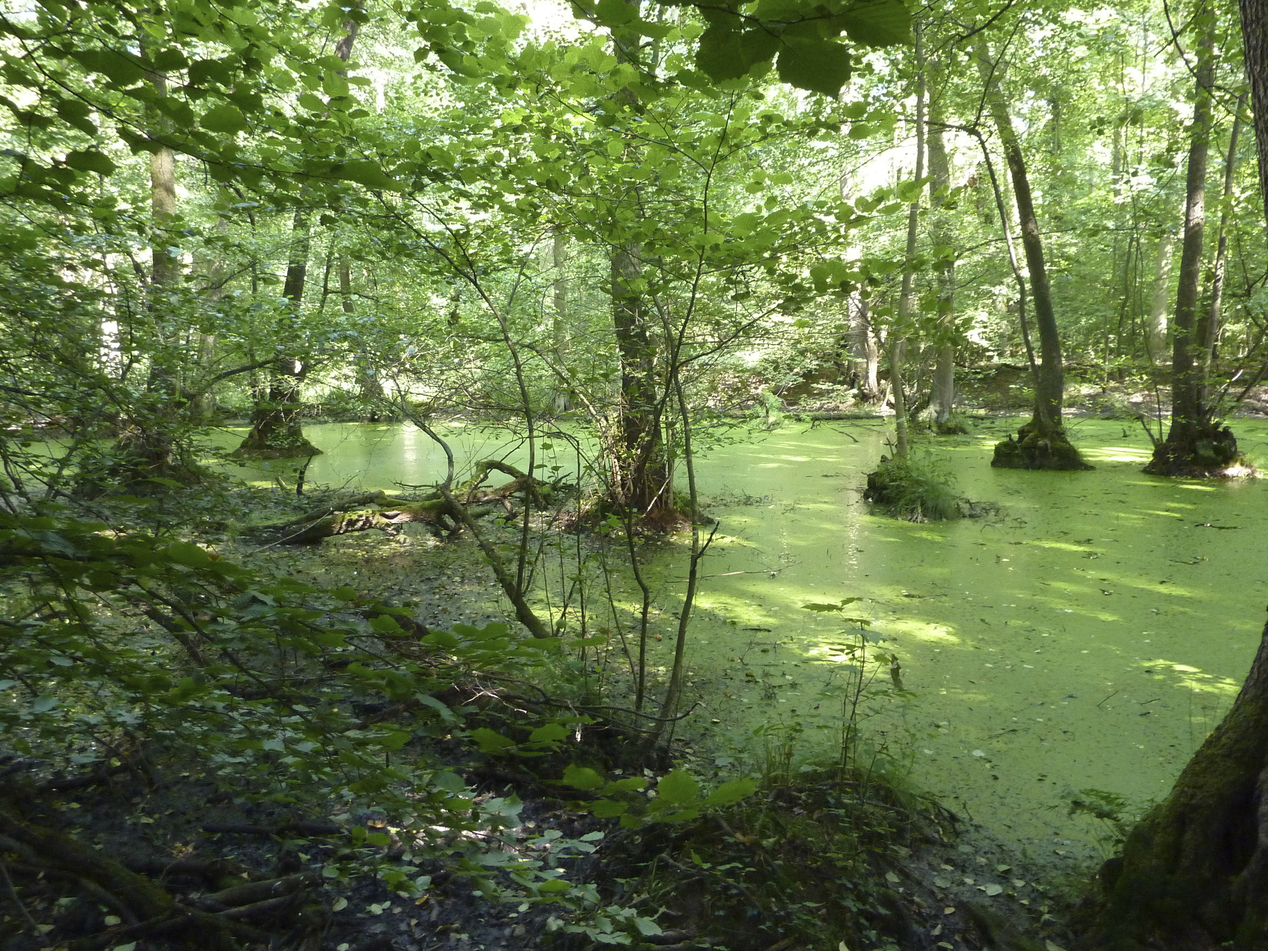 Frankfurt am Main, Stadtwald: Der Rohsee, auch Rohrsee oder Rodsee genannt, ein sumpfiges Stillgewässer auf dem Gebiet des Stadtteils Schwanheim, entstand aus einem linken bzw. südlichen Altarm des Mains. Das Gewässer fällt abhängig vom Grundwasserspiegel zeitweilig nahezu trocken. Der Rohsee zählt zu den artenreichsten Stillgewässern in Frankfurt. Das Foto zeigt den Nordteil mit Bestand von Schwarz-Erlen (Alnus glutinosa), gesehen vom nordwestlich gelegenen Rohseeweg aus, aufgenommen im August 2012. Die Wasseroberfläche des Sees erscheint hellgrün durch deren Bewuchs mit der Kleinen Wasserlinse (Lemna minor L.).